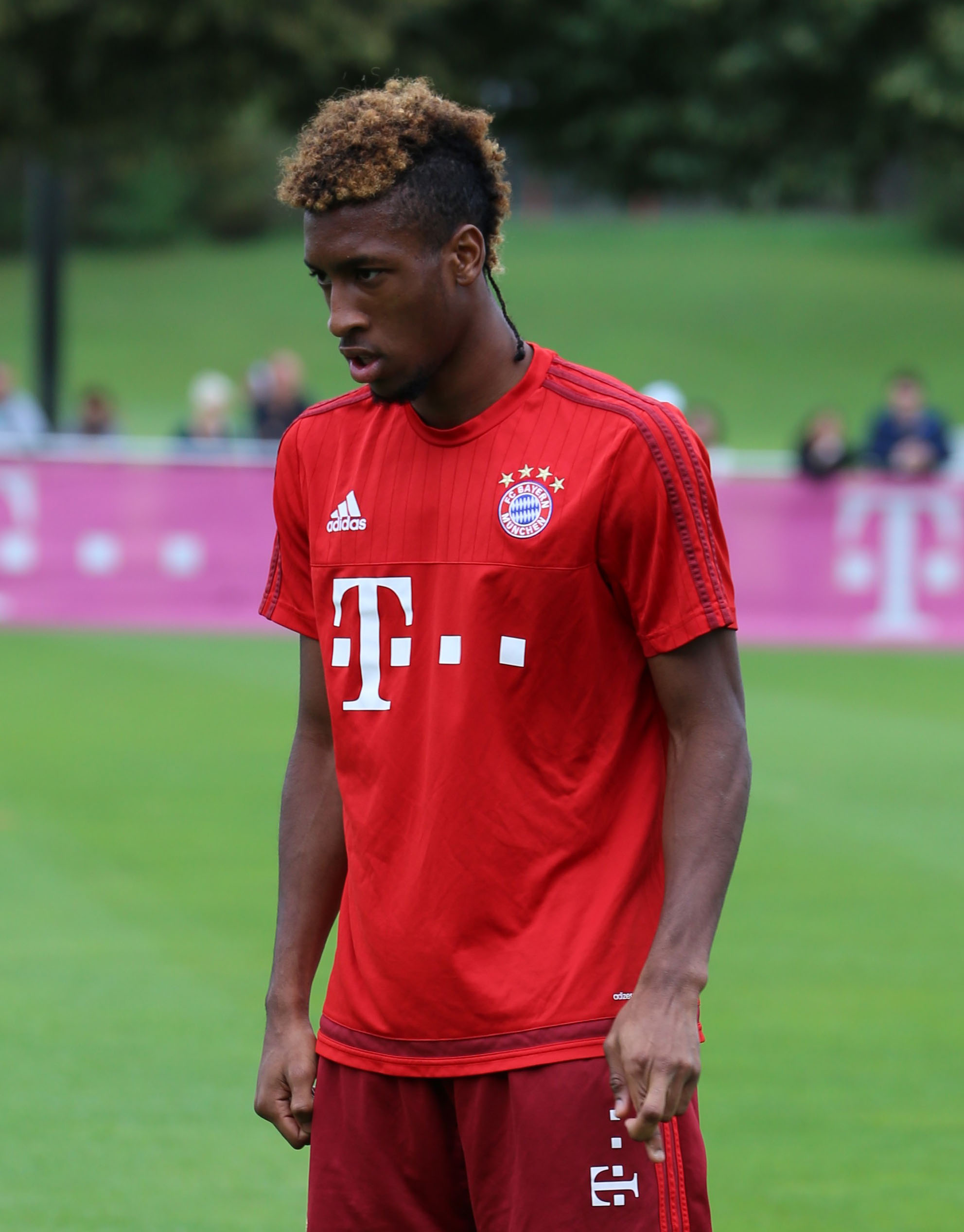 Kingsley Coman beim Training auf dem Gelände des FC Bayern München.